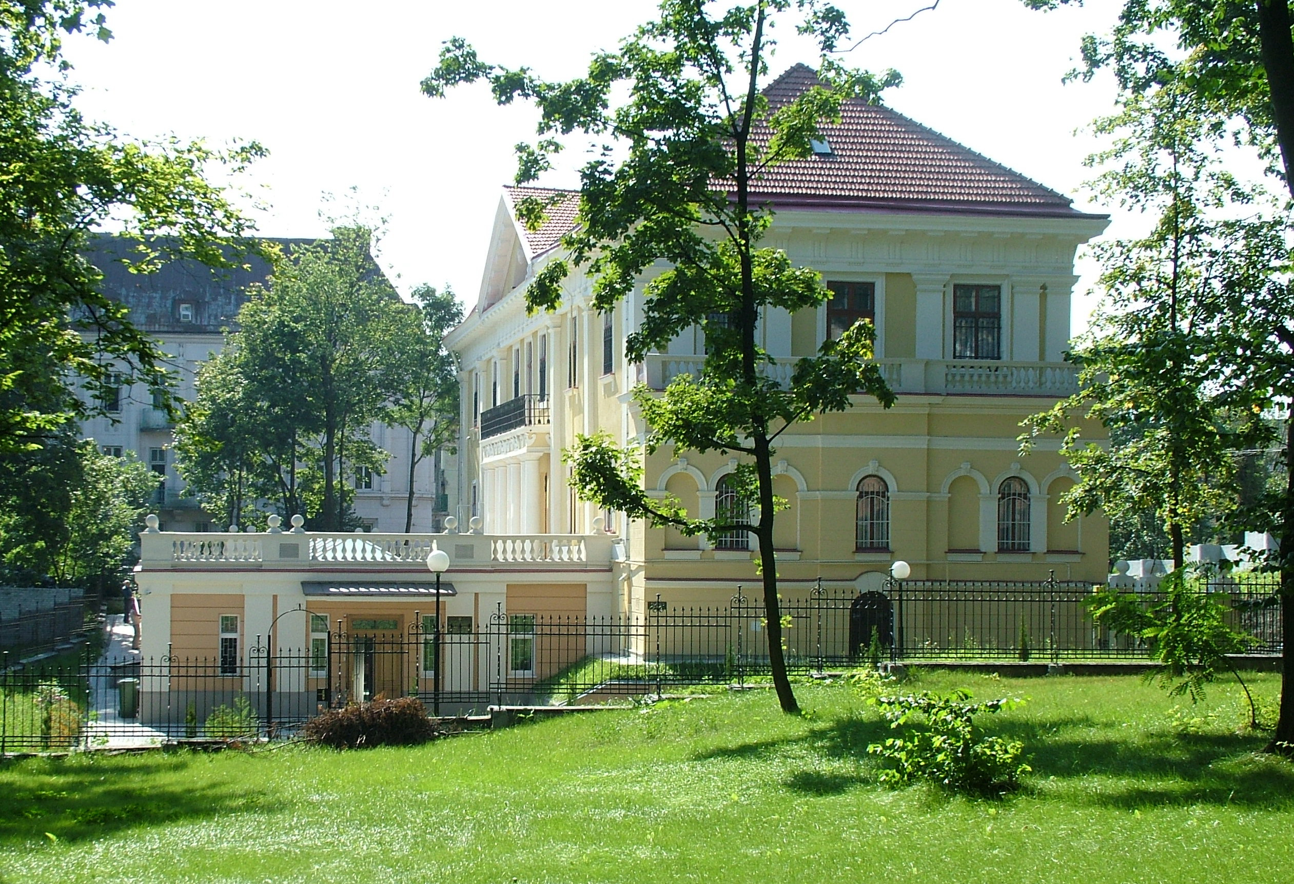 Biblioteka Baworowskich we Lwowie